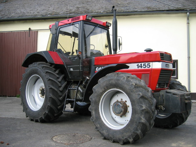 Traktor Case IH 1455 XL